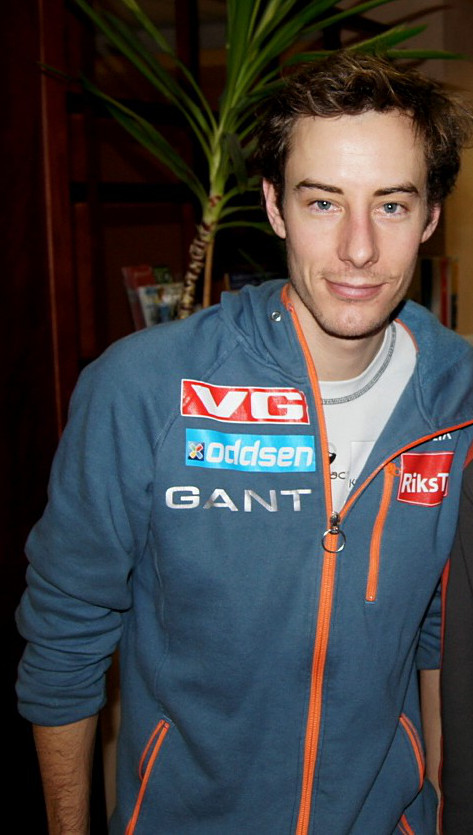 Ingvaldsen Ole Marius